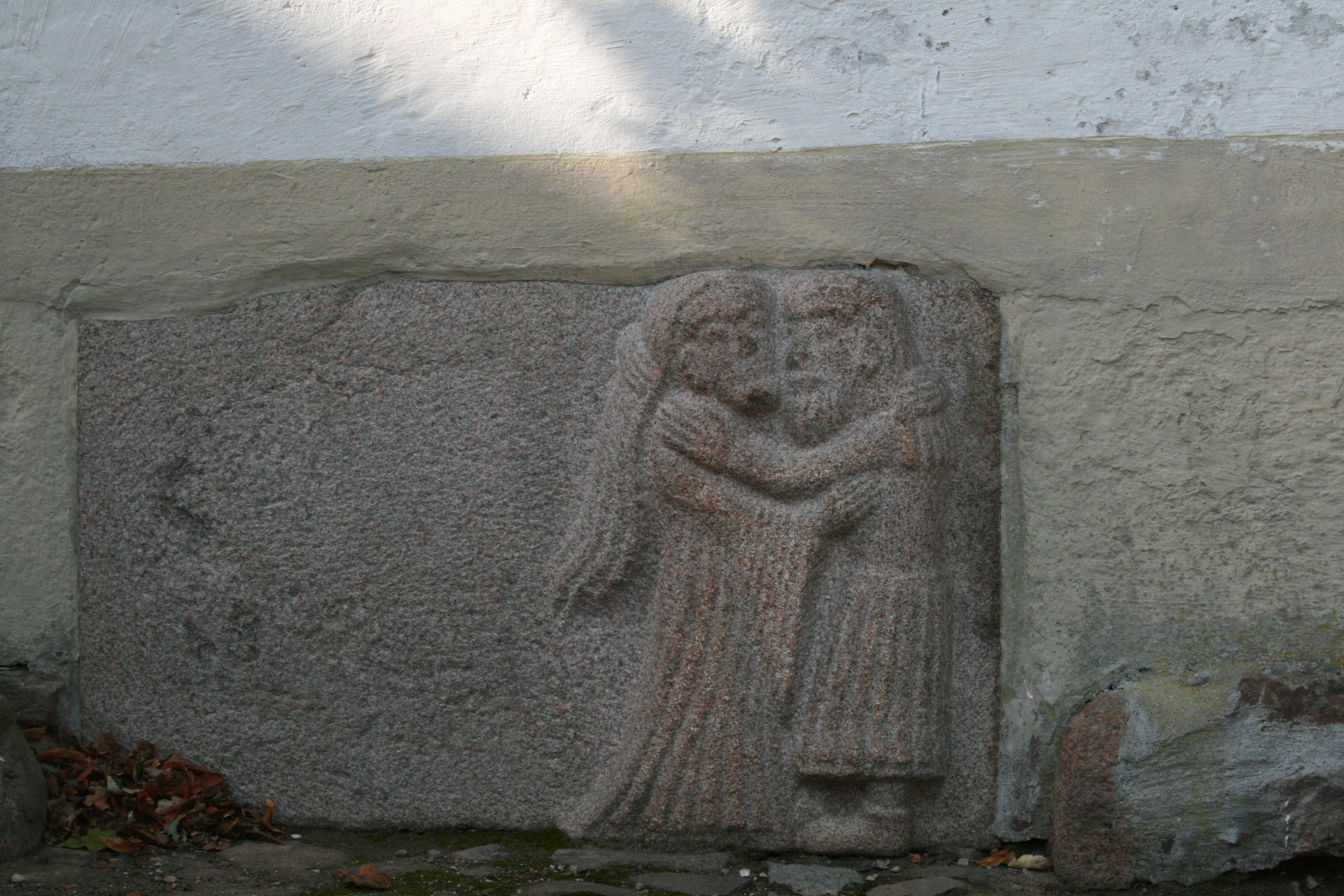 Romanisches Steinrelief im Sockel der Wilhadikirche in Ulsnis - September 2007.